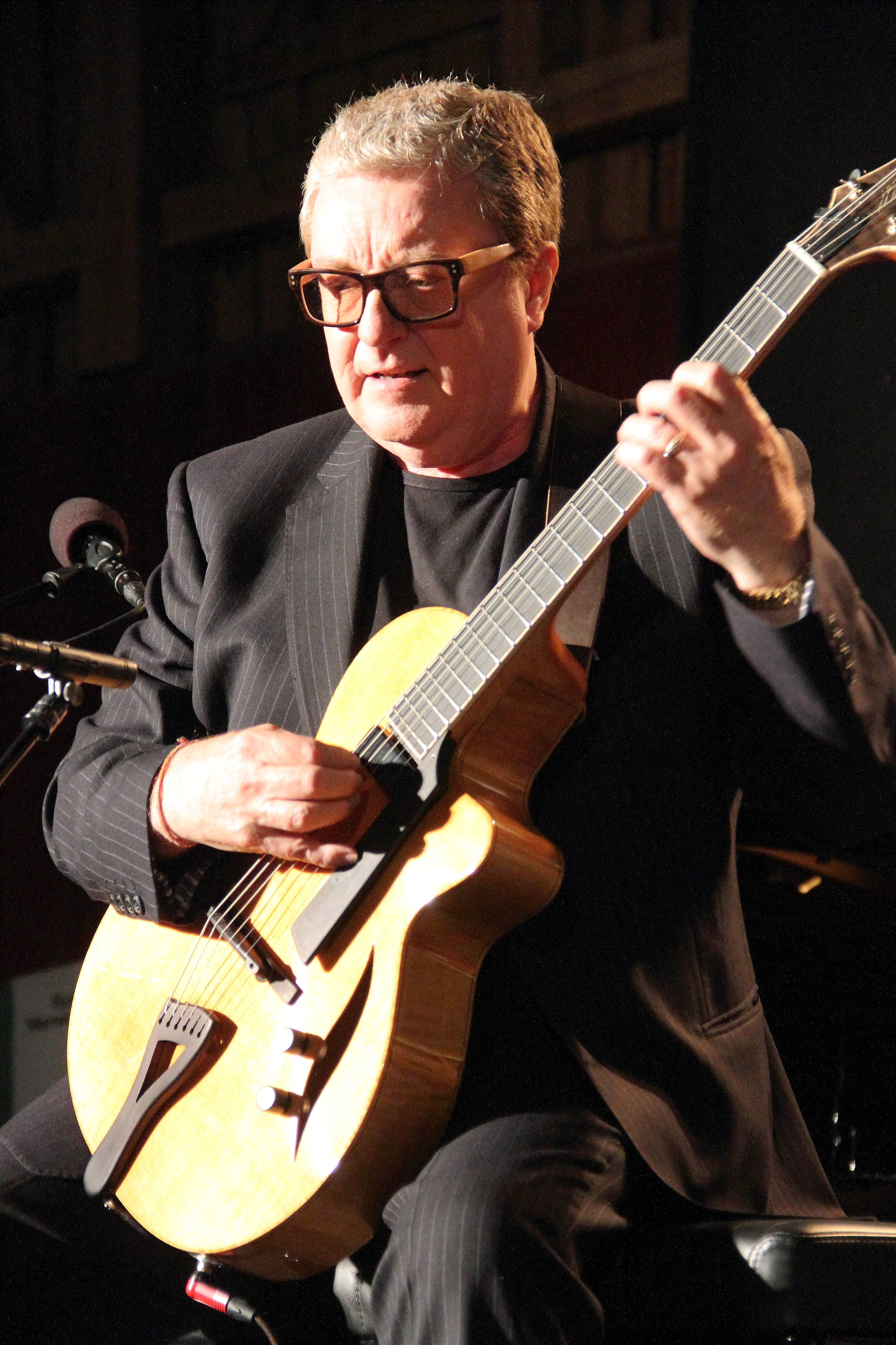 Der britische Jazzgitarrist Martin Taylor auf dem INNtöne Jazzfestival 2017.